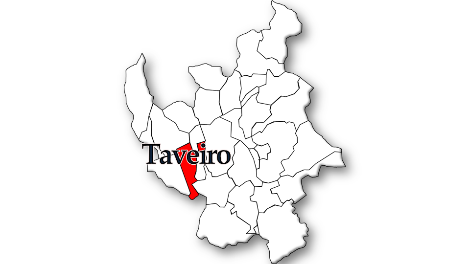 População